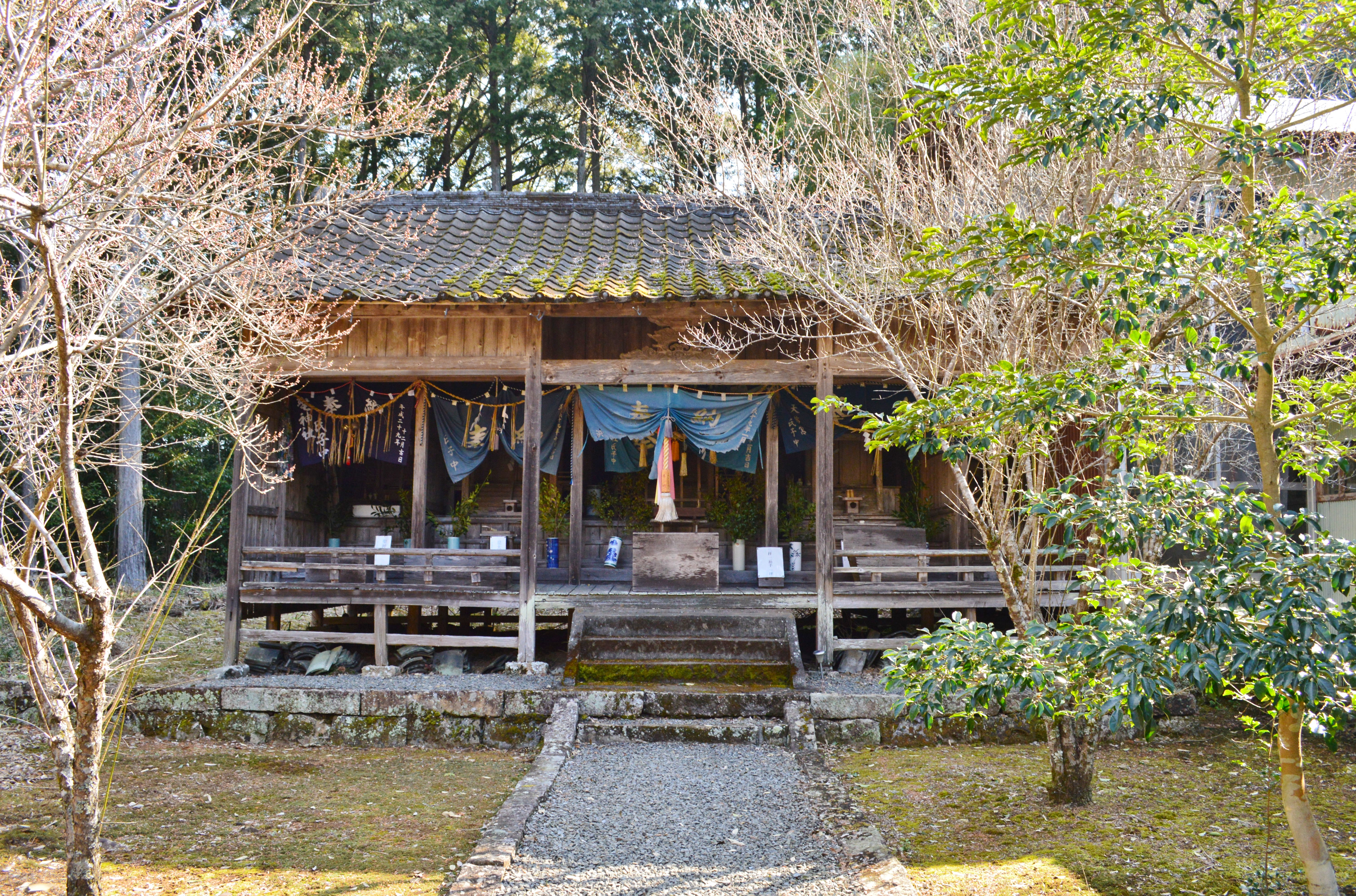 高知坐神社 境内社左宮